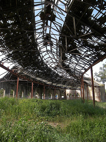 Corral de bustos